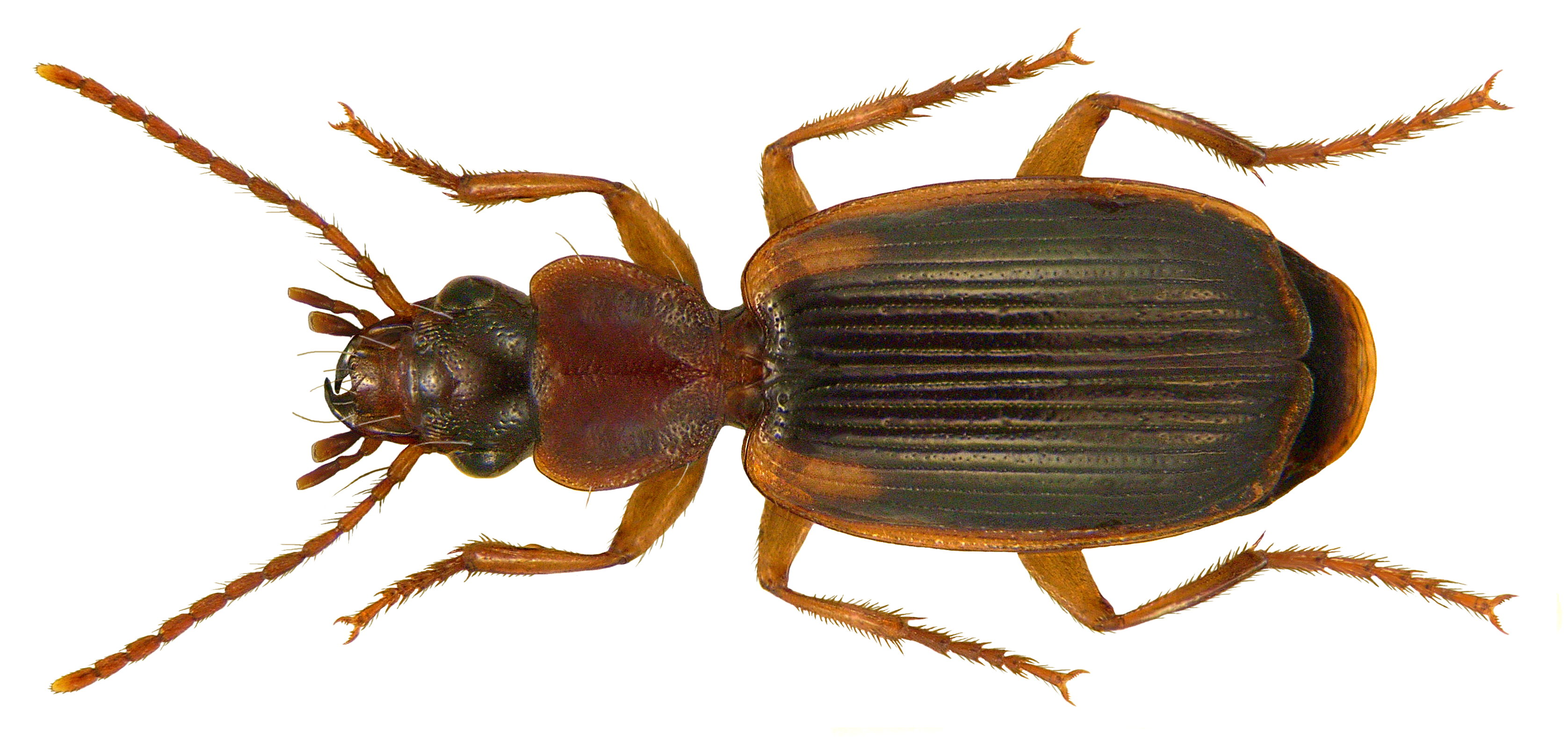 Familie: Carabidae Grösse: 7,5-10,5 mm Verbreitung: Nordafrika, Europa bis Westasien Ökologie: wärmeliebende Art, besonders an Kalkhängen und Trockenrasen Fundort: England, Southwell Landslip, Portland leg.det. J.M.Walters, 2004 Foto: U.Schmidt, 2009